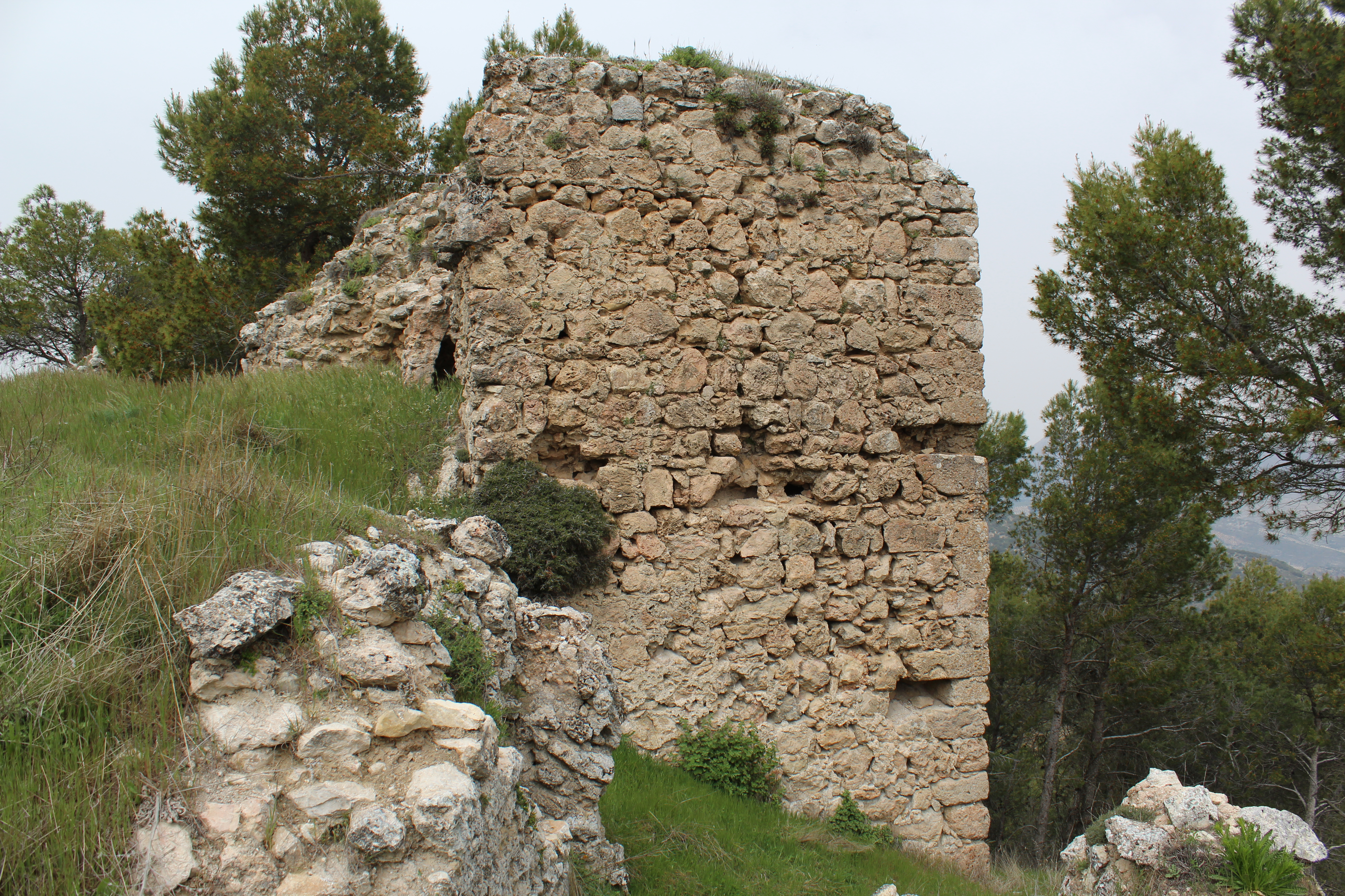 Torre poligonal en una de las esquinas del recinto exterior, de origen castellano.